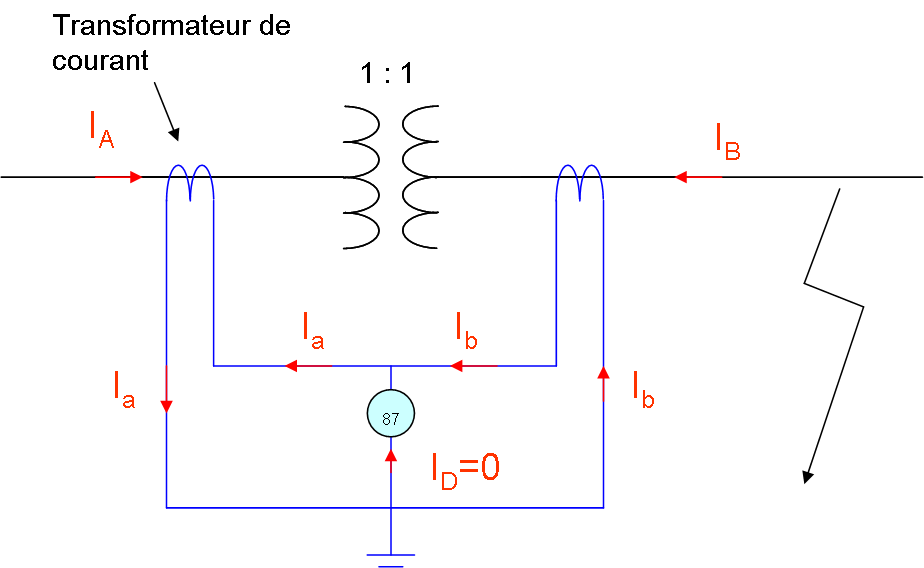 Illustration fonctionnement d'une protection différentielle, défaut externe